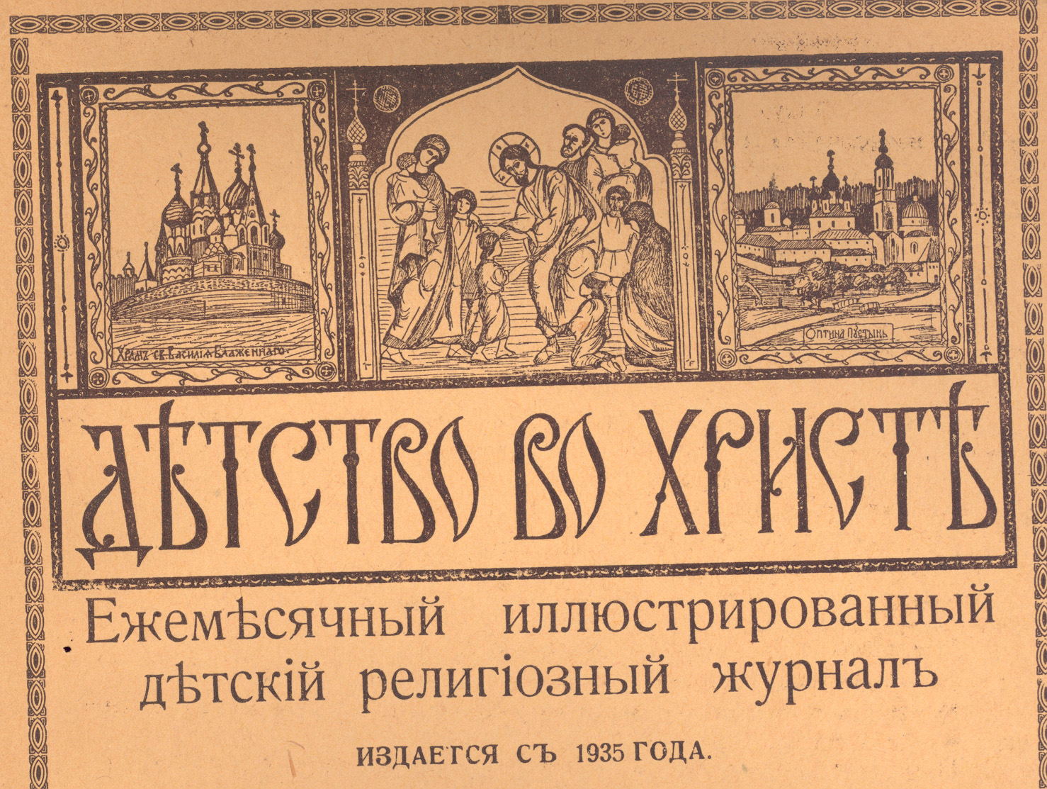 "Детство и юность во Христе" периодика, продукция Типографского братства пр. Иова во Владимировой